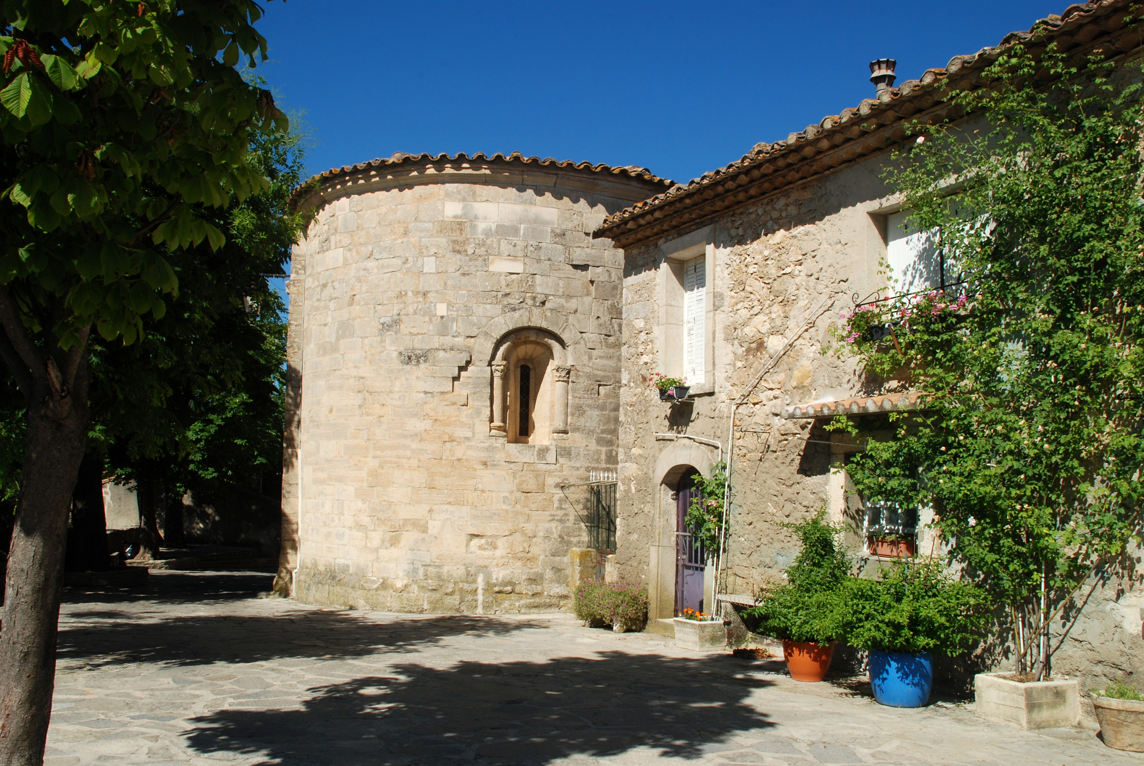 France - Hérault - Église Saint-Michel de Guzargues